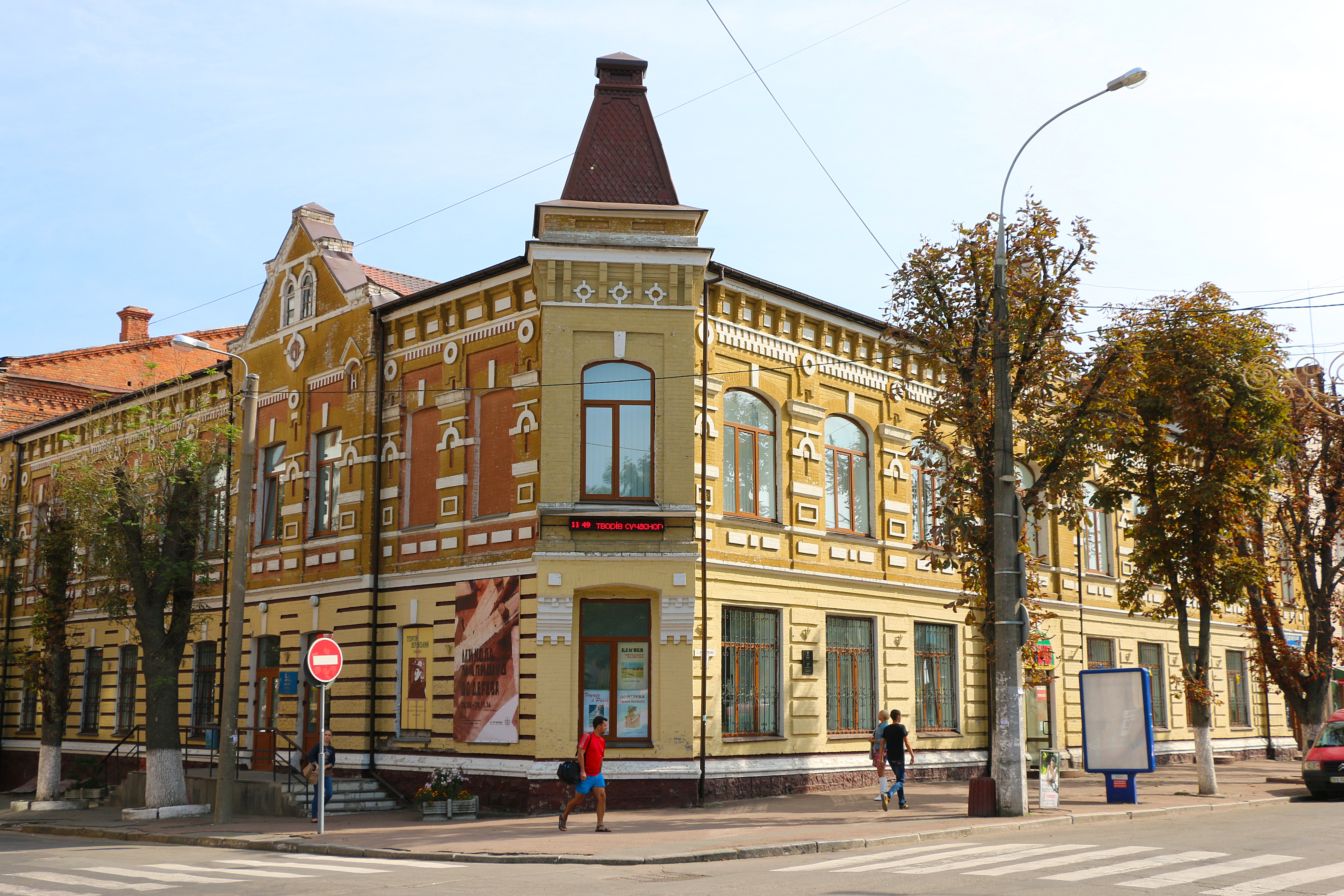 Об'єднаний банк (домовласник Ніренберг), де розміщувався штаб 1-ої Української Радянської дивізії (мур.), Хмельницький, вул. Проскурівська, 47